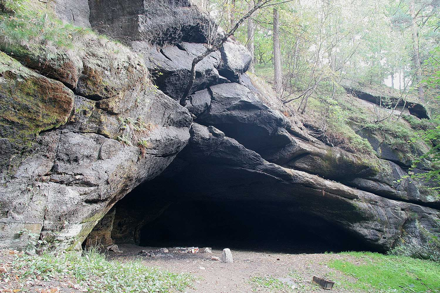 Velká cikánská jeskyně u Sloupu v Čechách autor:Prazak date:20. 9. 2006